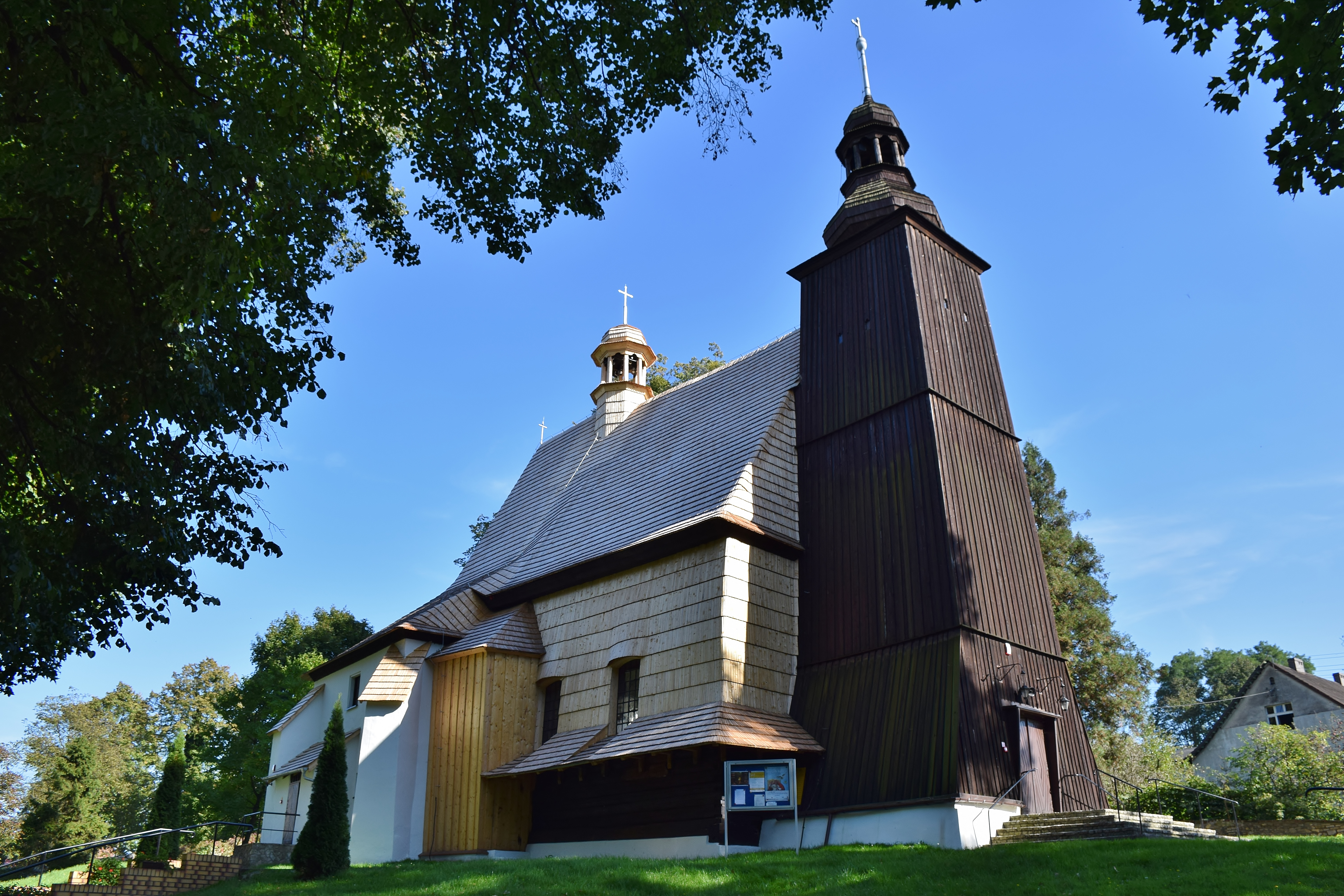 Sieroty, kościół par. p.w. Wszystkich Świętych, 1470, 1707, 1770